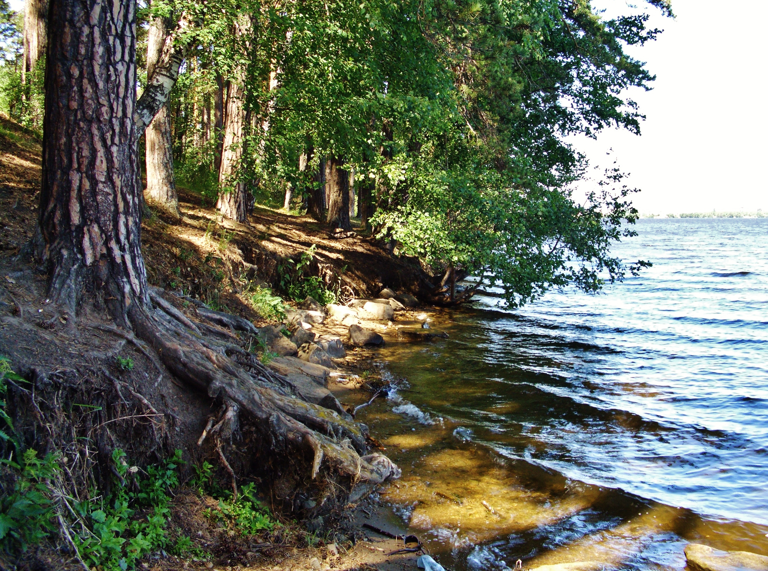 Ильменское озеро.